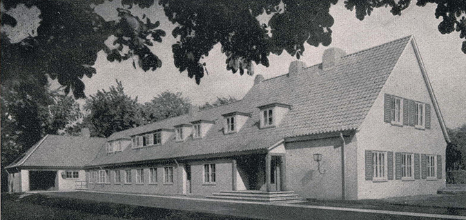 Firmensitz Wohnen und Fabrikation 1950er Jahre